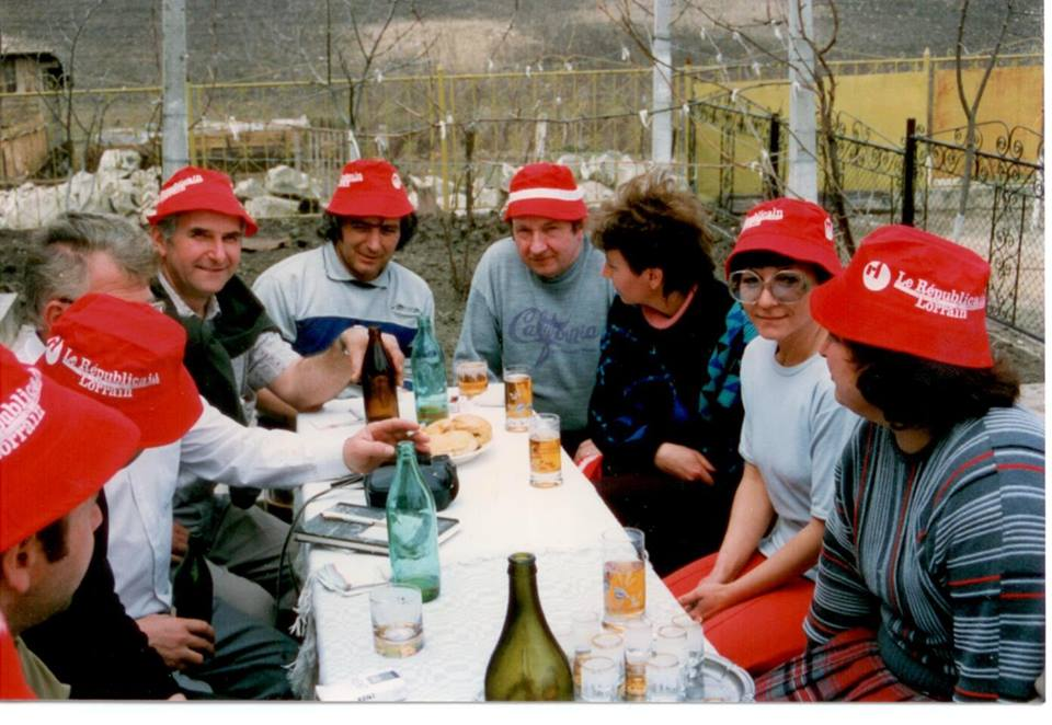 Intalnirea din Aruncuta intre membrii celor doua comunitati : Musson {Belgia} si Aruncuta. In prim plan se afla criticul literar Alexandru Cistelecan ,gazda belgienilor . Sursa fotografiei :Arhiva Al.Cistelecan .